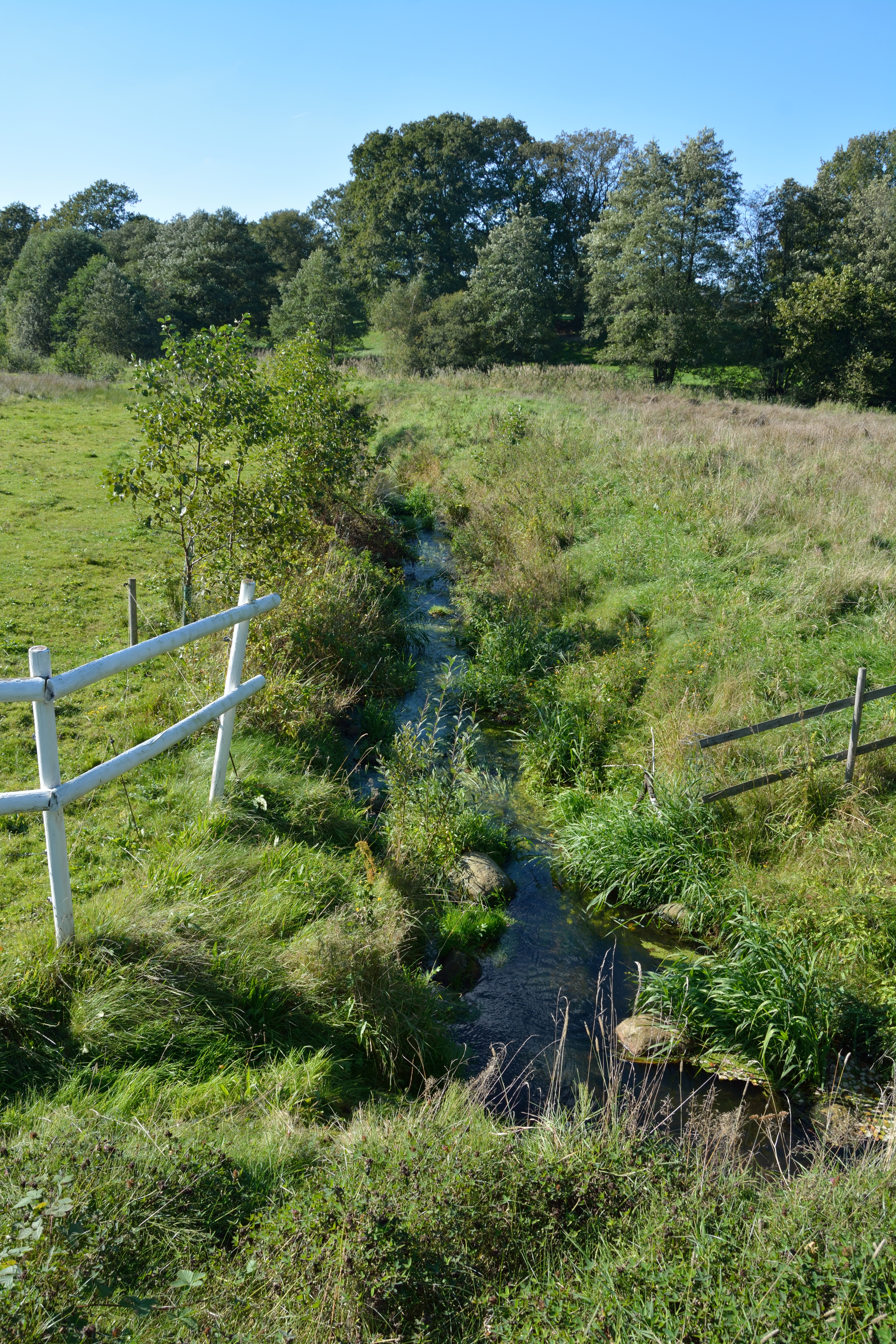 Holstenniendorf, Besdorfer Bach